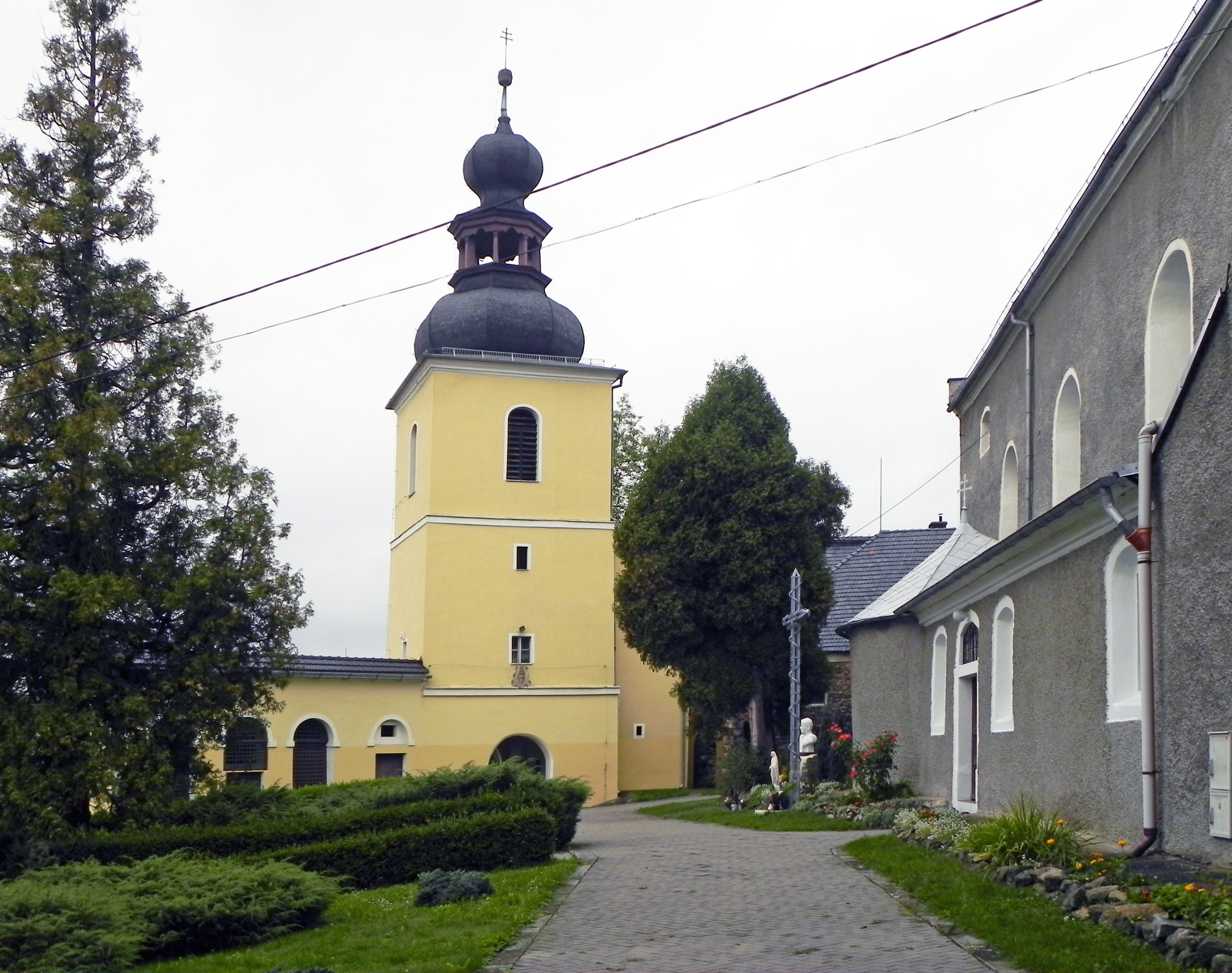 Szalejów Górny, dzwonnica, 1683